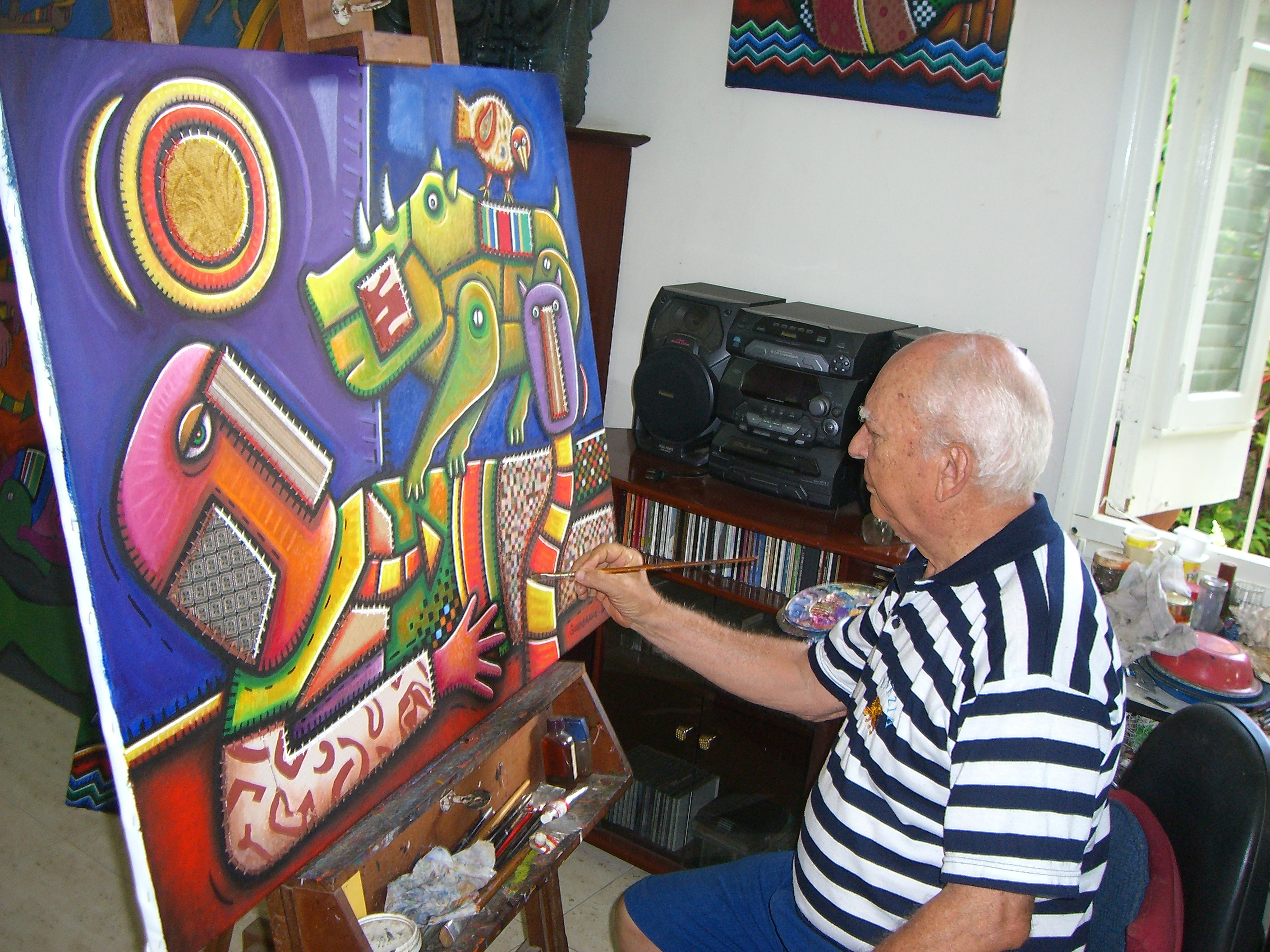 Il Maestro Alfredo Sosabravo mentre dipinge